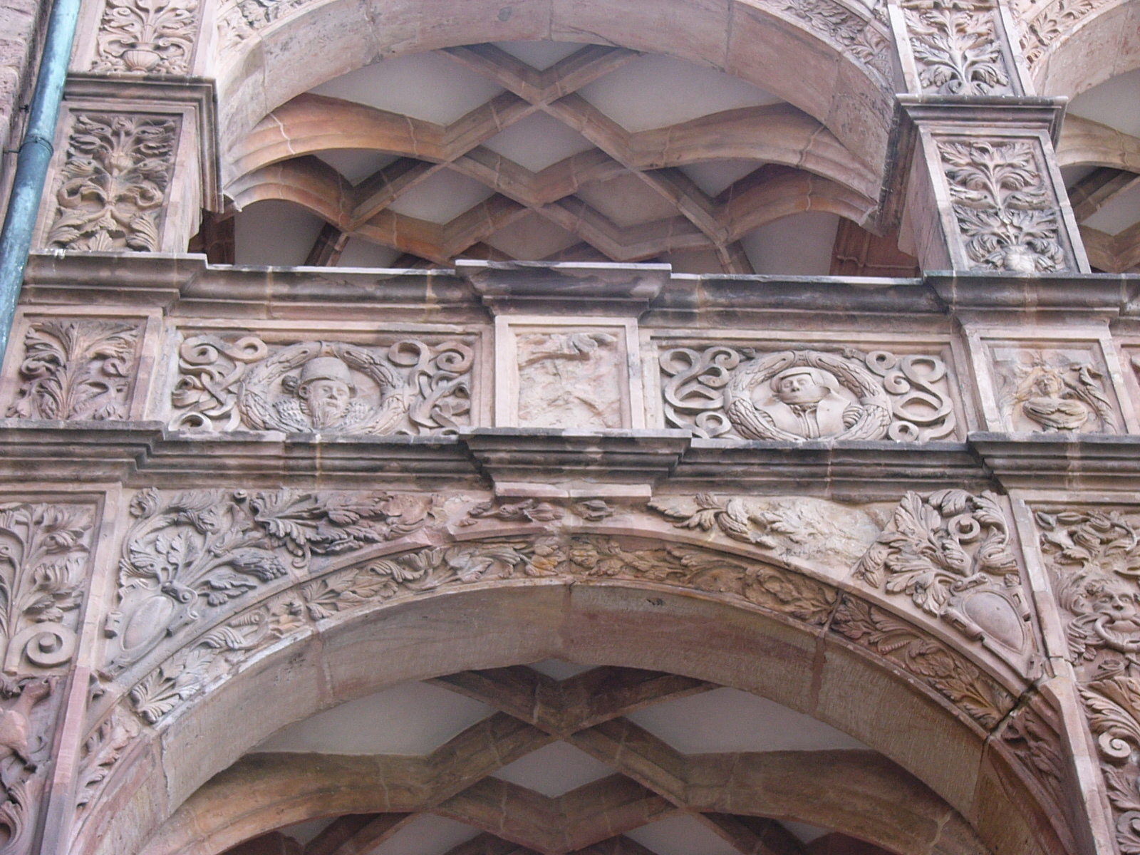 Details im Schönen Hof auf der Plassenburg, Georg Friedrich und Elisabeth